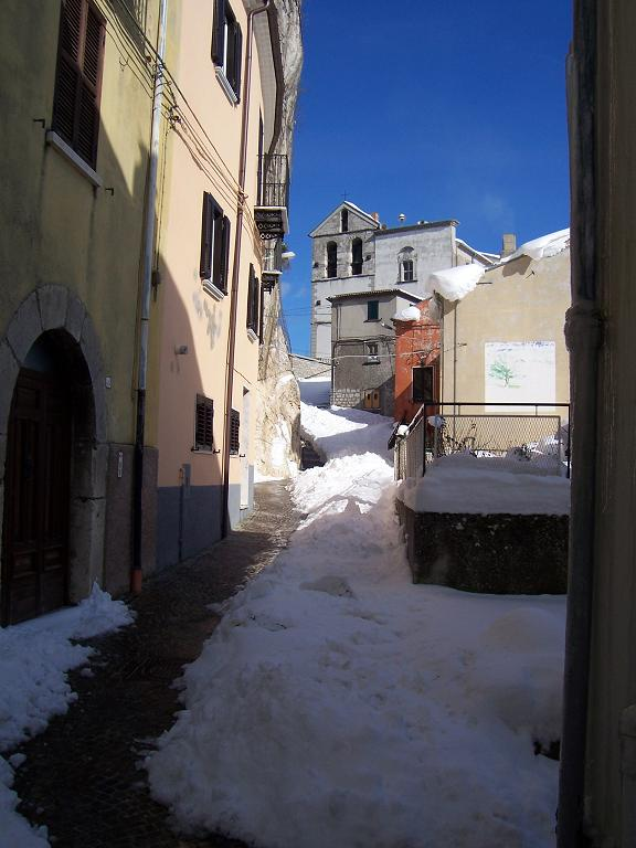 Palazzo Baronale e sullo sfondo la Chiesa di Santa Maria Assunta